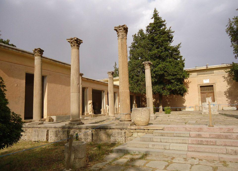 Territoires et monuments de l'antique Thamugadi.